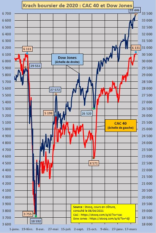 Valeur quotidienne en clôture du CAC 40 (échelle de gauche) et du Dow Jones Industrial (échelle de droite) du 2 janvier au 9 avril 2020.